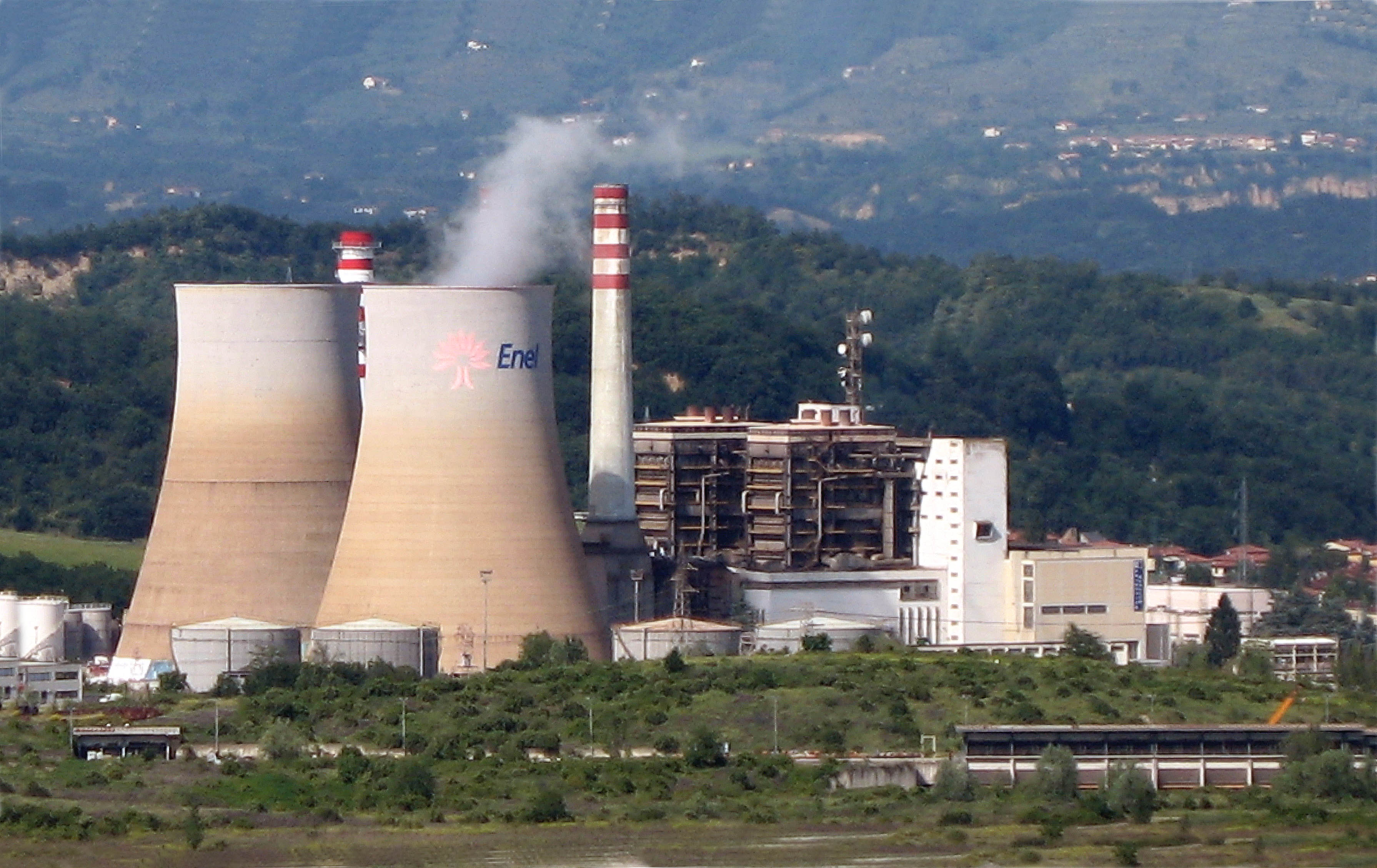 Centrale elettrica di Santa Barbara a Cavriglia